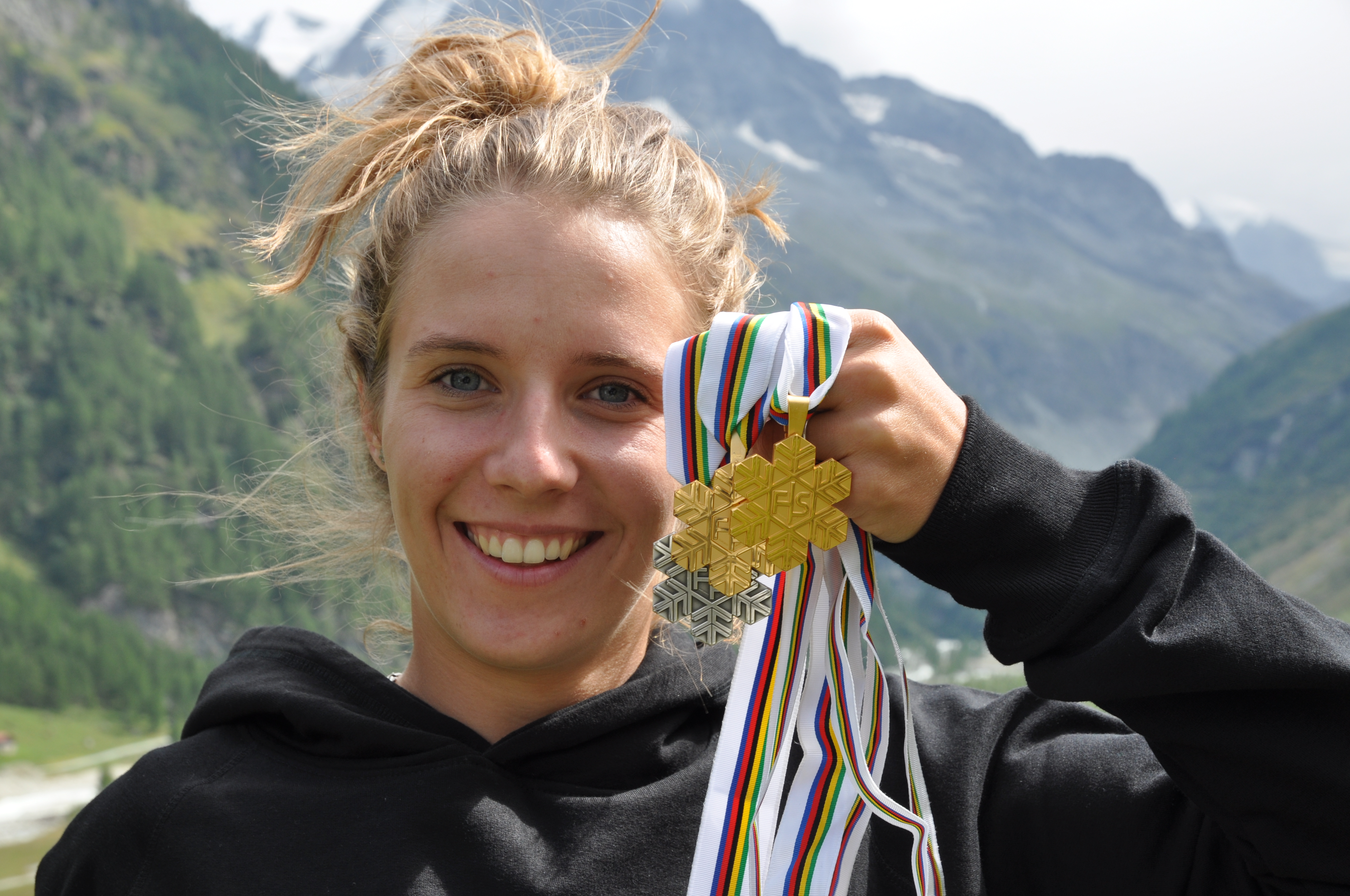 Camille Rast été 2019